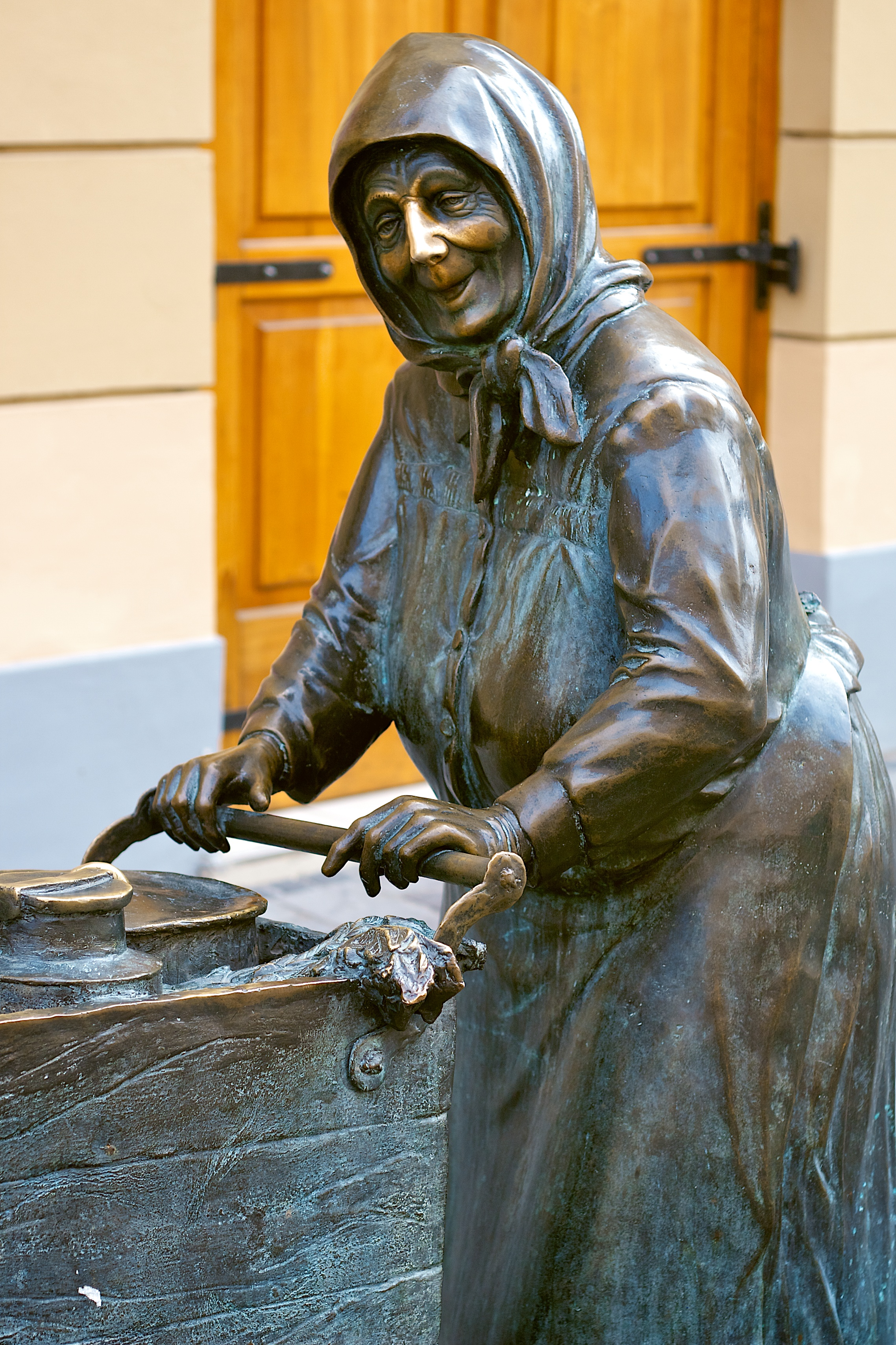 Székesfehérvár